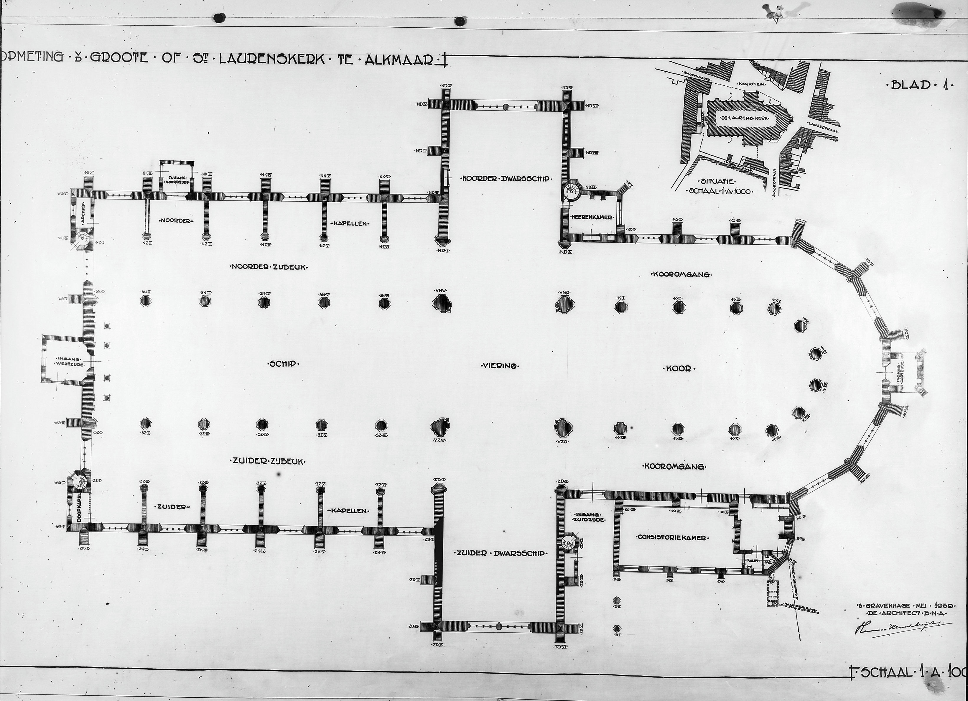 Grote- of St.Laurenskerk: Plattegrond